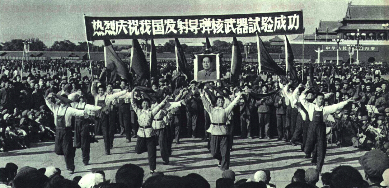 1966-10 1966年庆祝中国发射导弹核武器试验